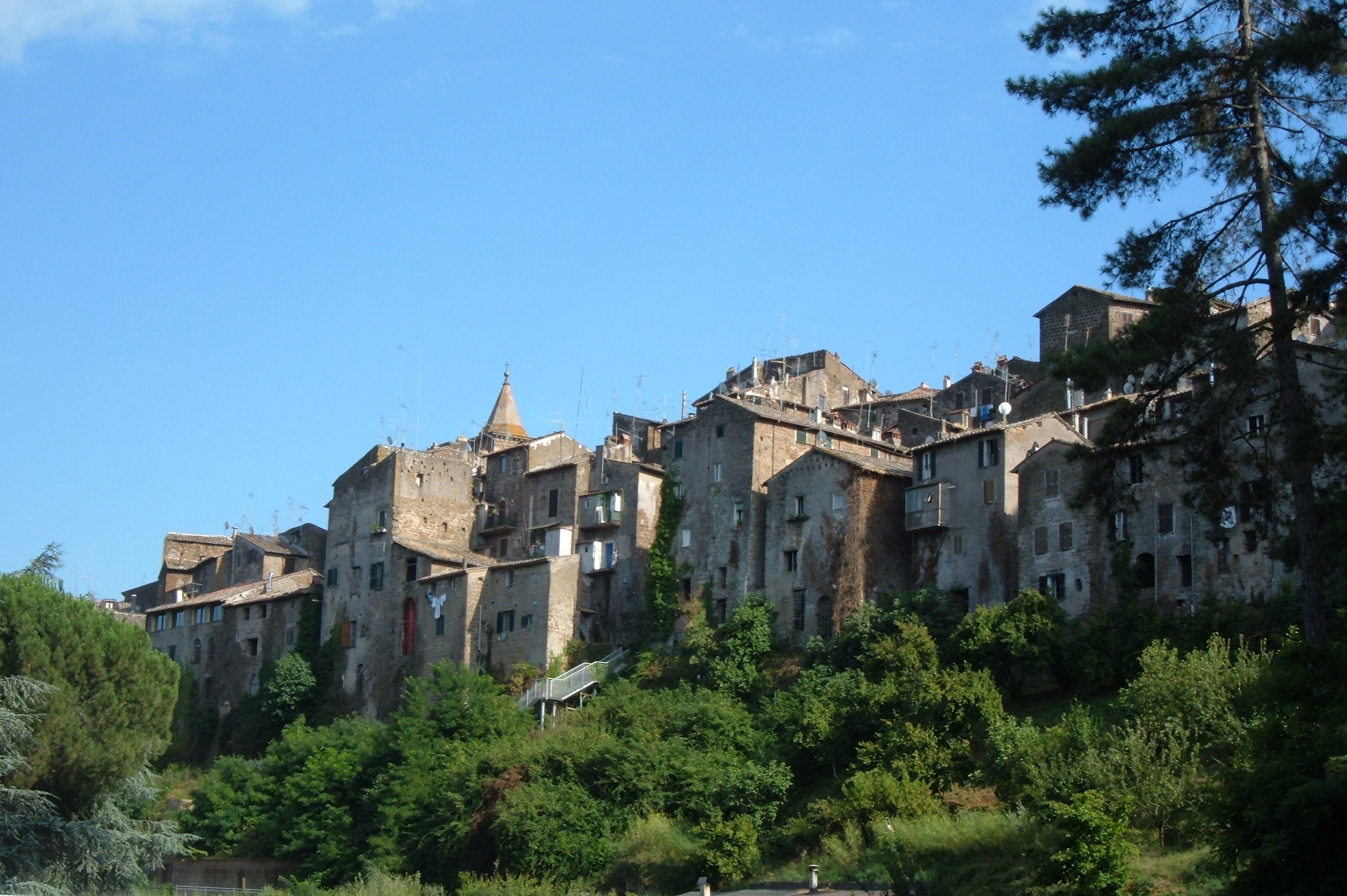 Capranica_-_Panorama